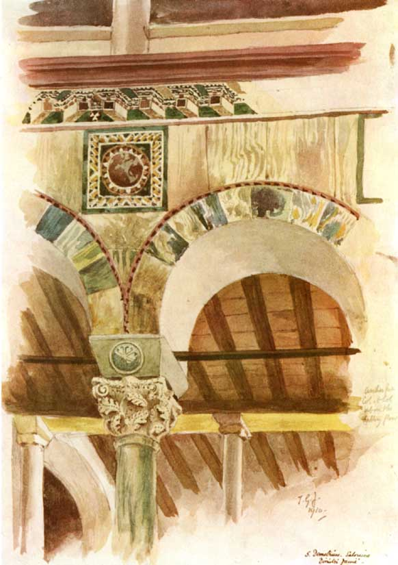 Интерьер базилики св. Димитрия (Салоники) до пожара 1917 года (акварель)